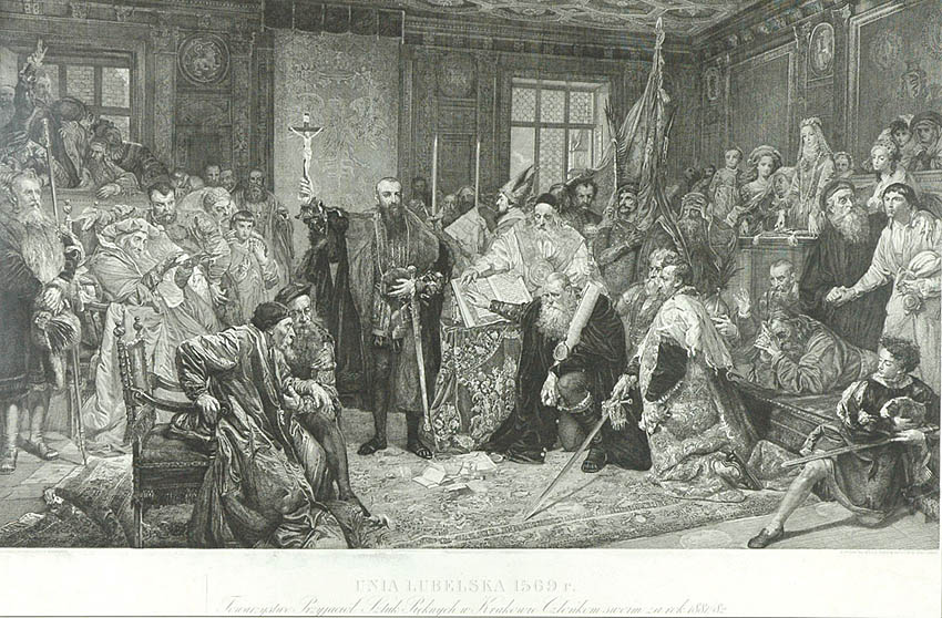 Henryk Redlich, miedzioryt Zygmunt August w Lublinie 1569 wg obrazu Jana Matejki Unia lubelskamiedzioryt, papier, 51,5 x 77,5 cm